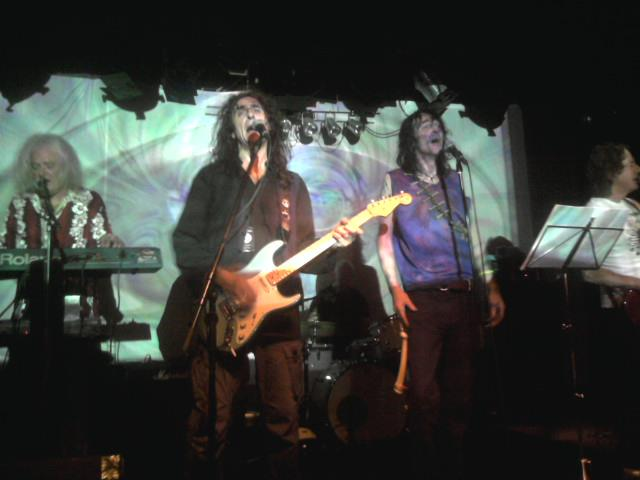 The Hawklords (feat. Ron Tree on vocals and Harvey Bainbridge on synth) live in Weinheim, Cafe Central